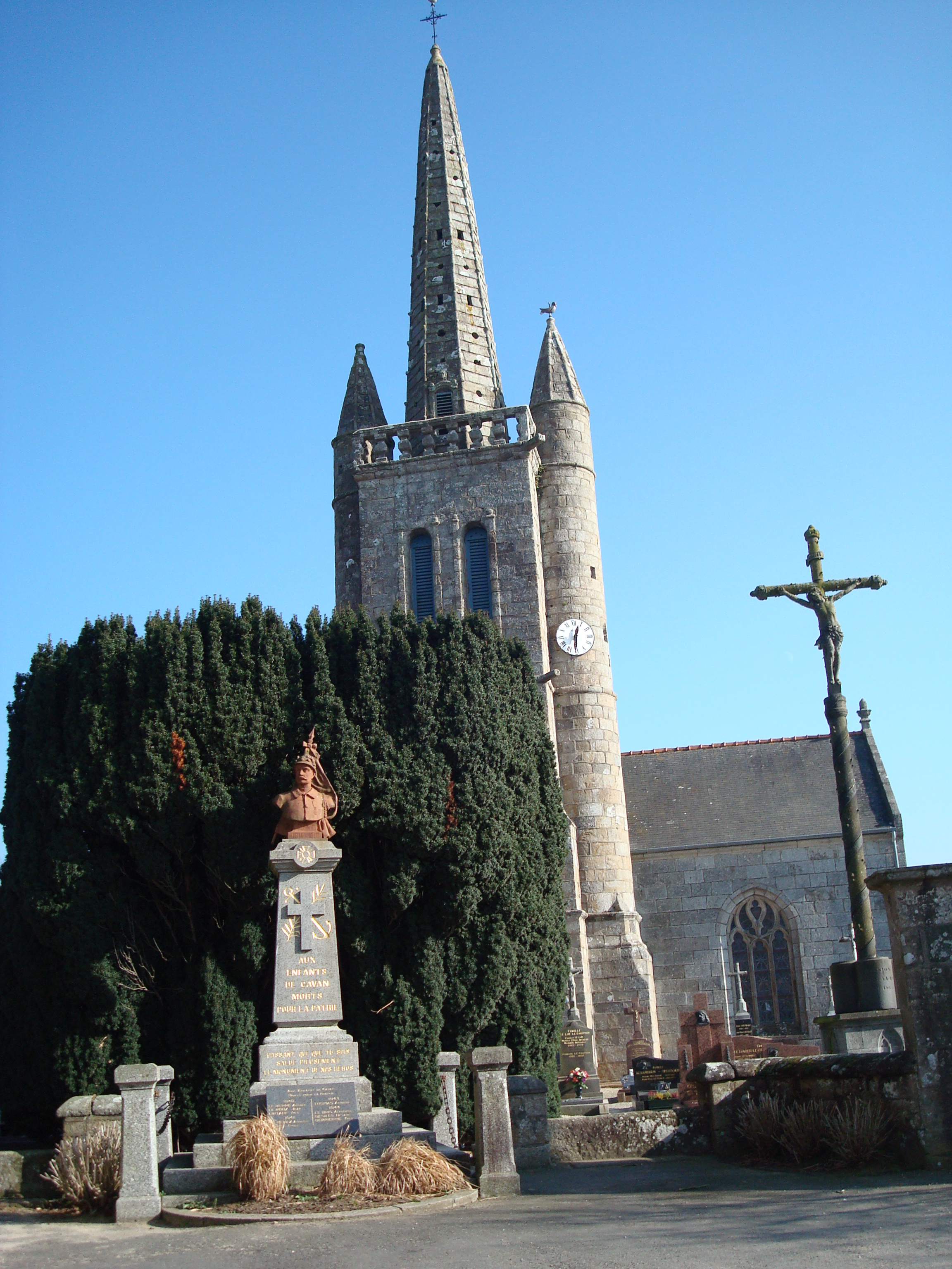 Iliz Kawan luc'hskeudennet eus tu an ti-kêr